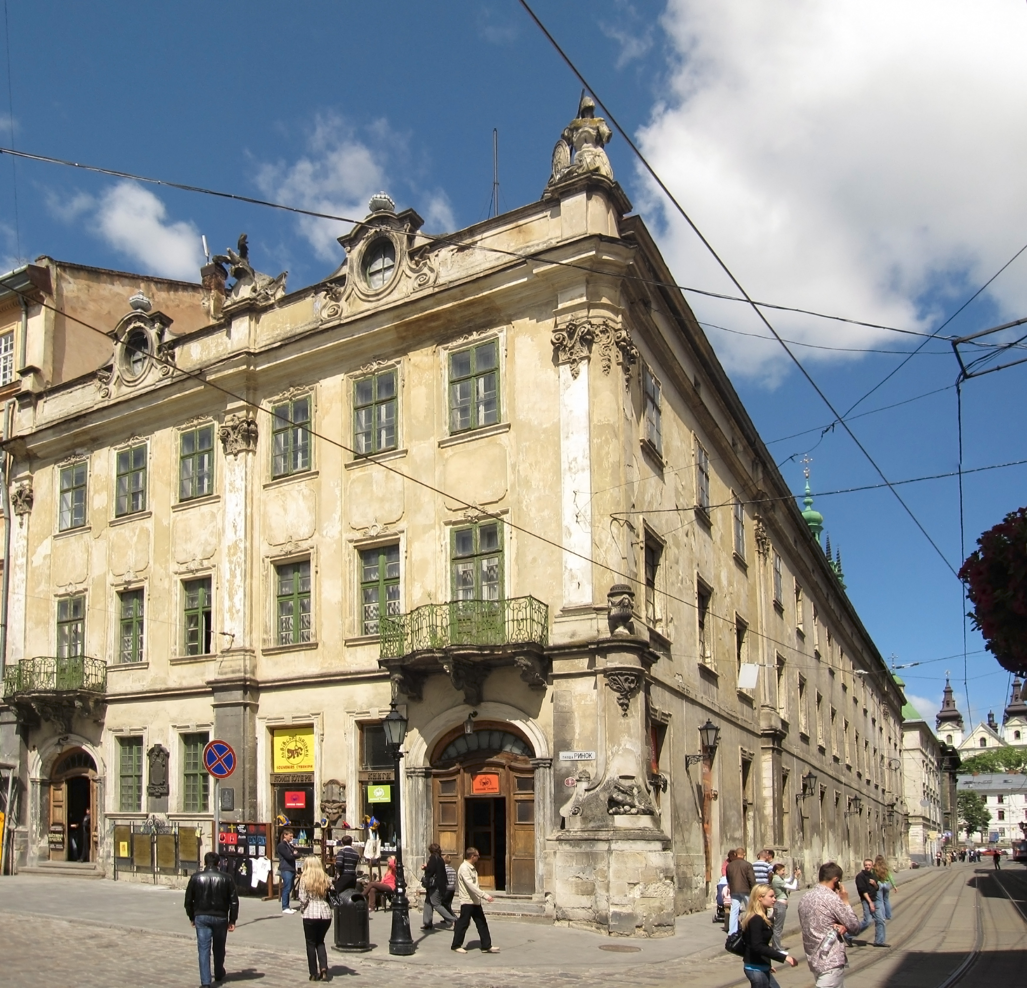 Rynek of LwowRynek of Lwow